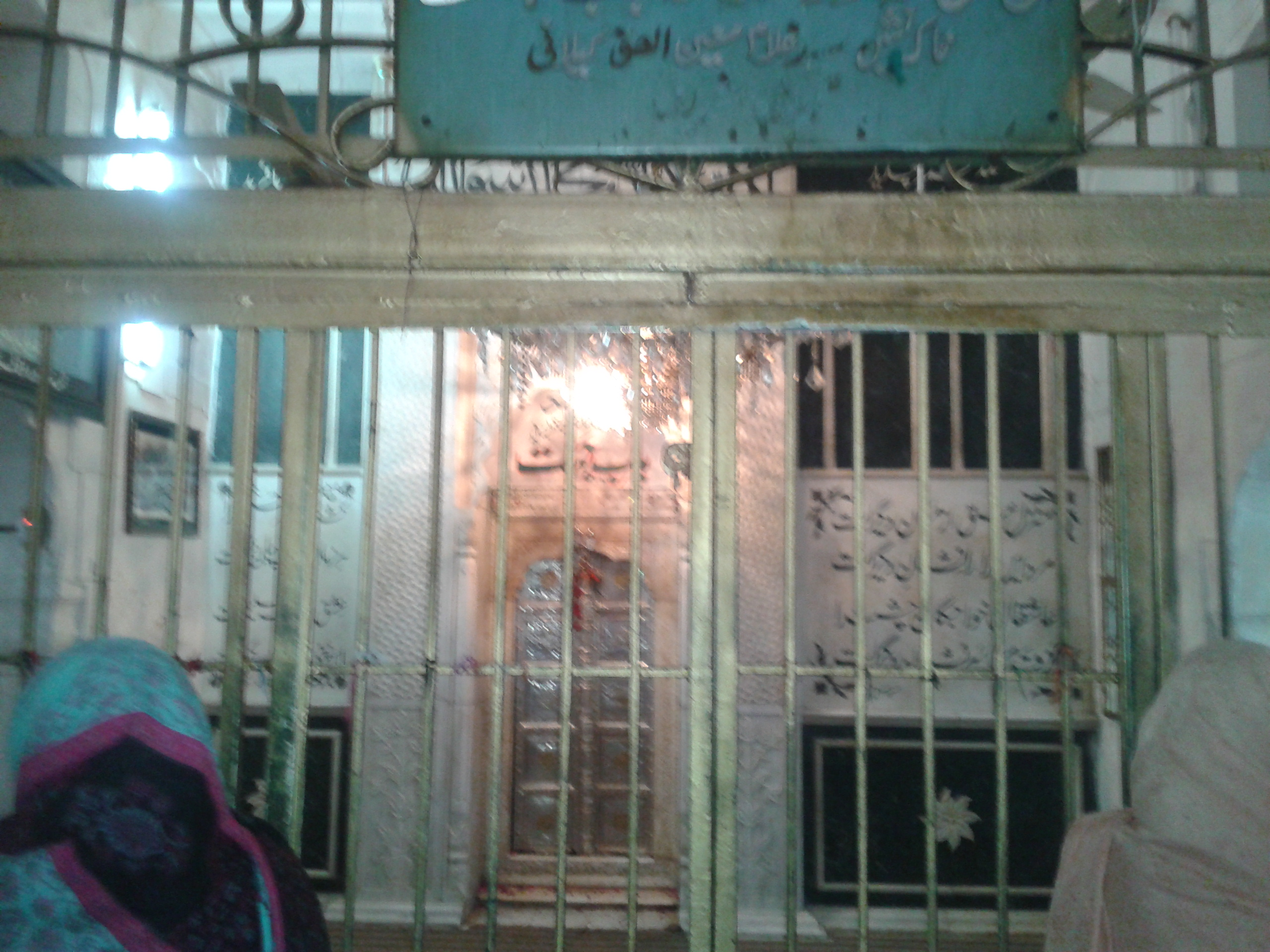 Bab-e-Jannat at Darbar Hazrat Baba Farid ud Deen Ganj Shakar Rahmatullah Alaih